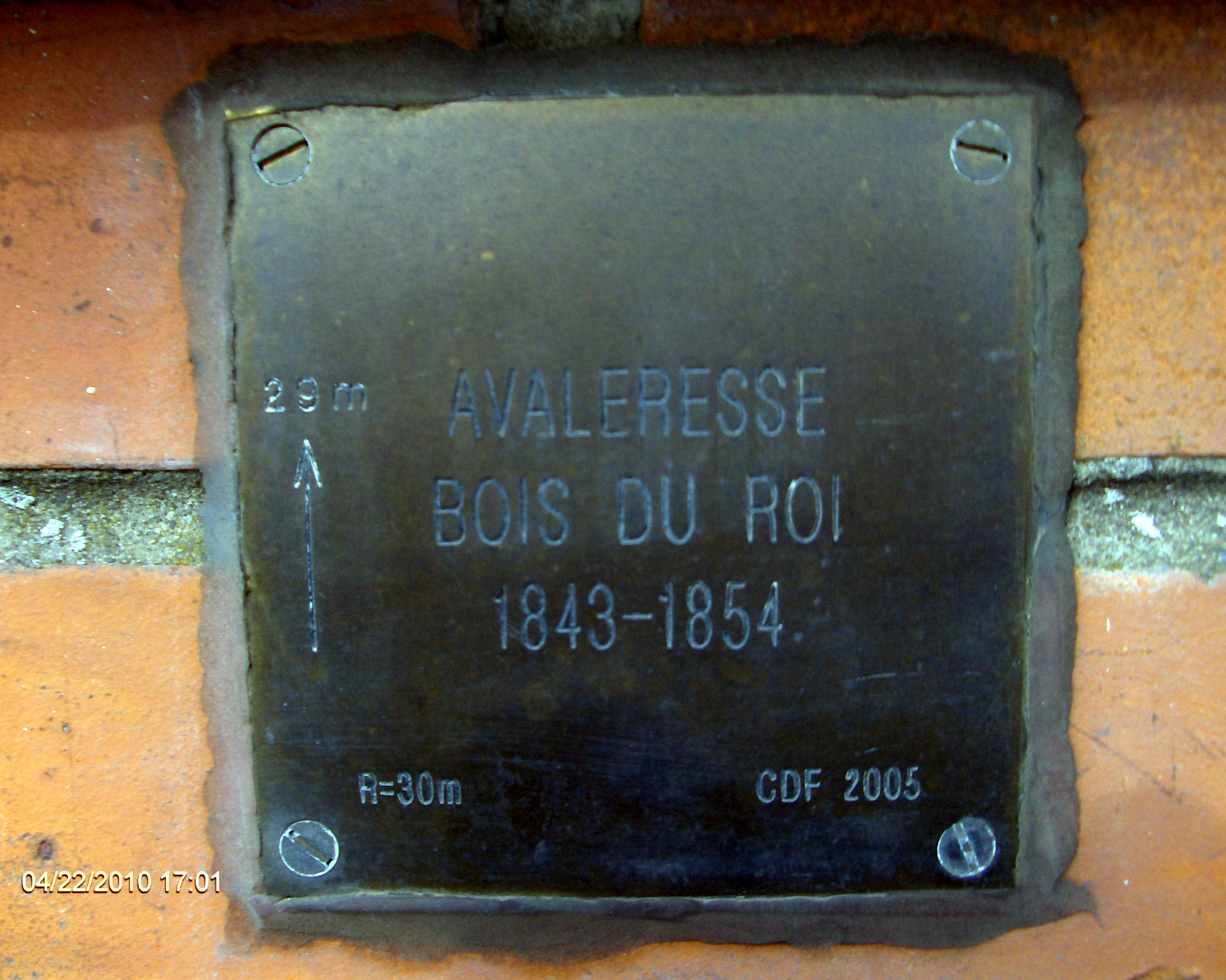 Sépulture de La fosse Bois du Roi de Condé sur l'Escaut